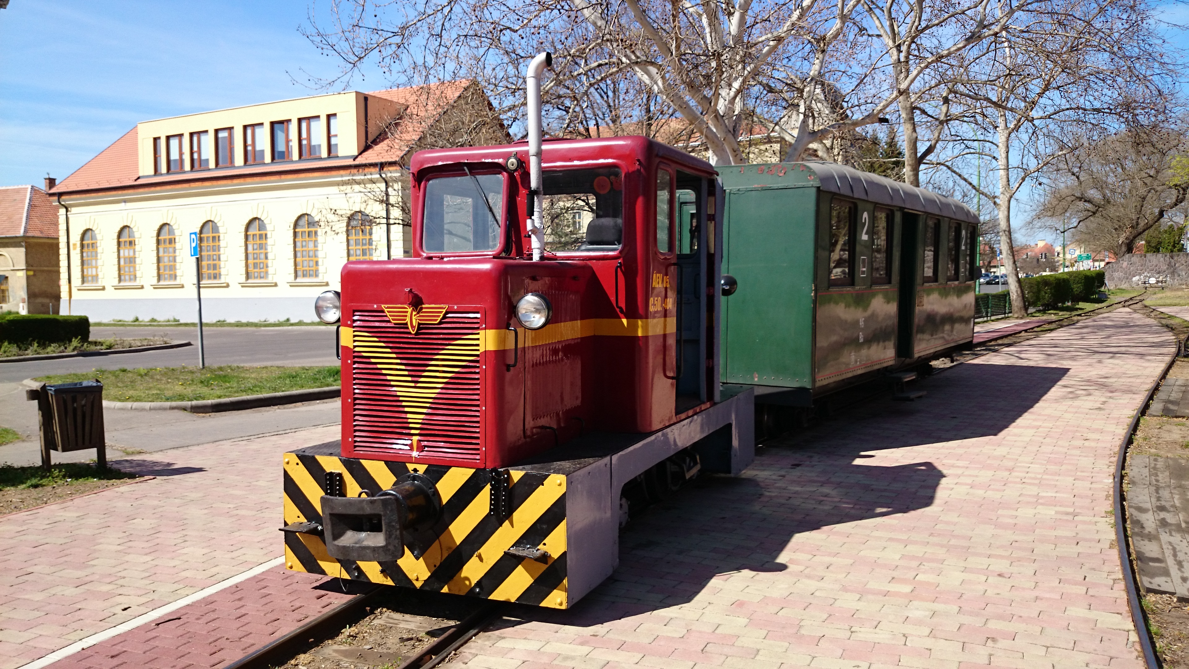 C.50-404 indulásra készen.